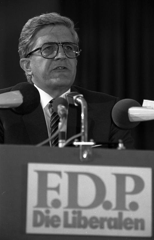 32. Ordentlicher Parteitag der FDP in der Halle 8 des Kölner Messegeländes.